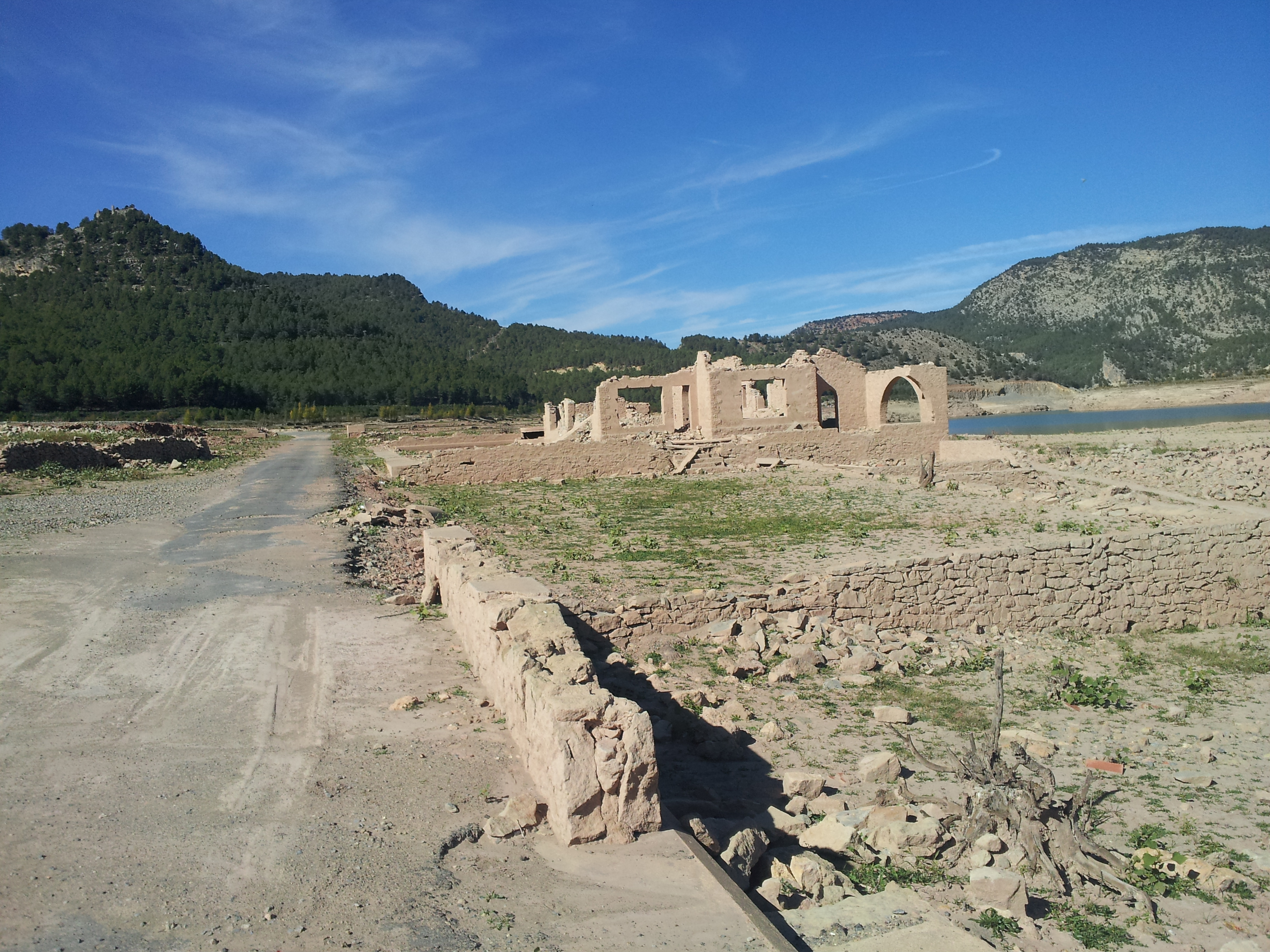 Fons del pantà d'Arenós. Fotografia presa en un moment que el Pantà tenia poca aigua i deixava a la vista les runes dels antics poblats. Campos de Arenoso.